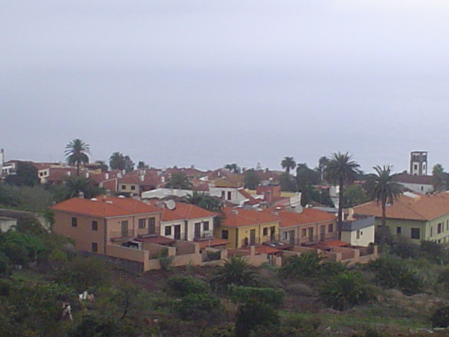 Tacoronte-vista desde el mercado